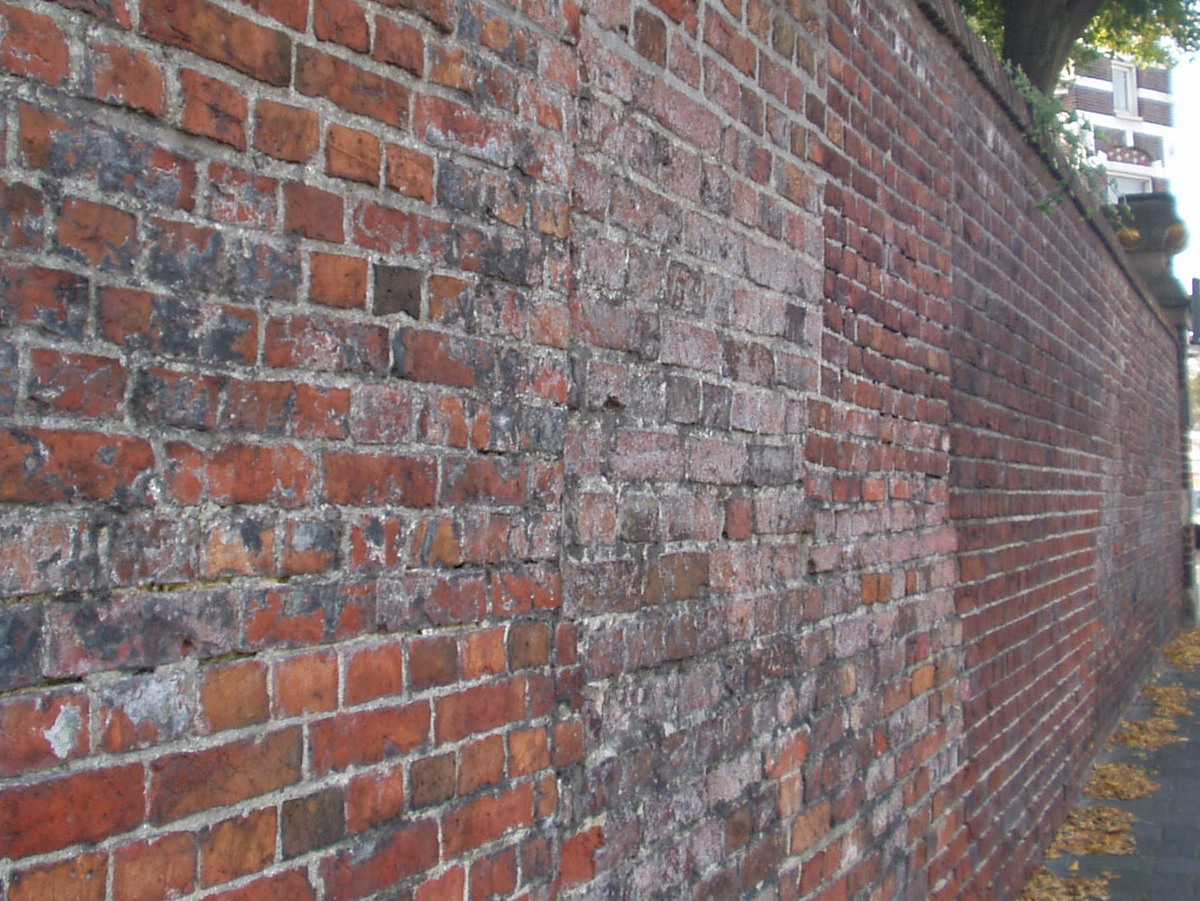 Muur, in verschillende perioden opgebouwd uit verschillende steensoorten. Muur met verschillende soorten steen gemetseld.